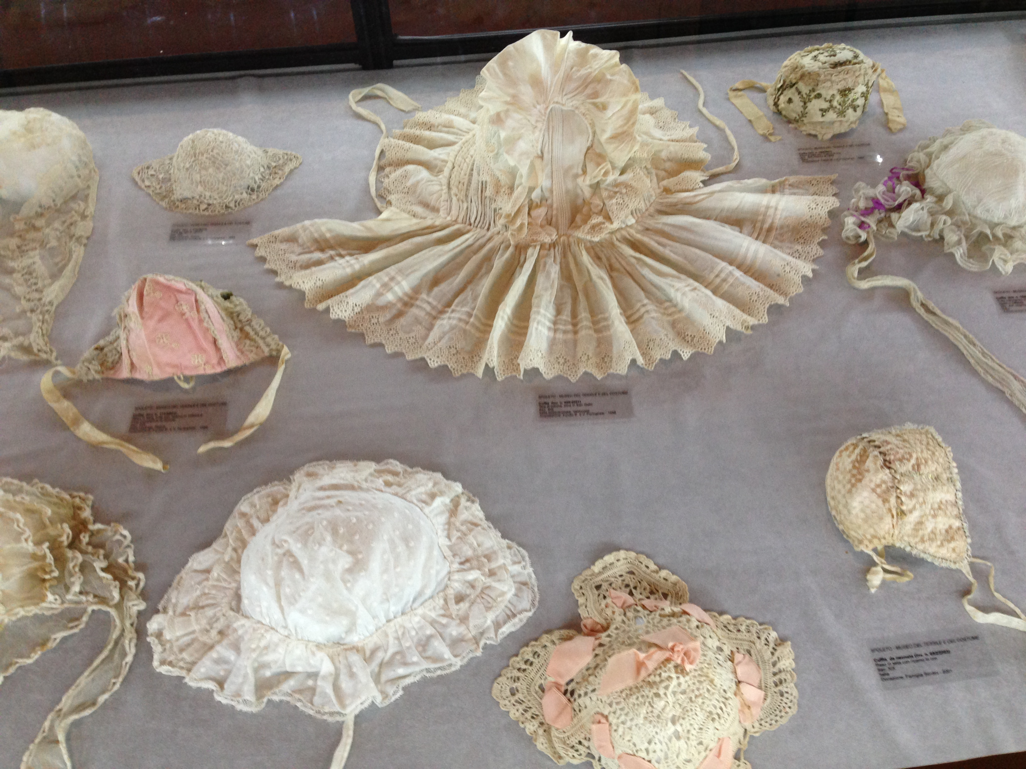 Copricapi. Museo del tessile e del costume. Spoleto